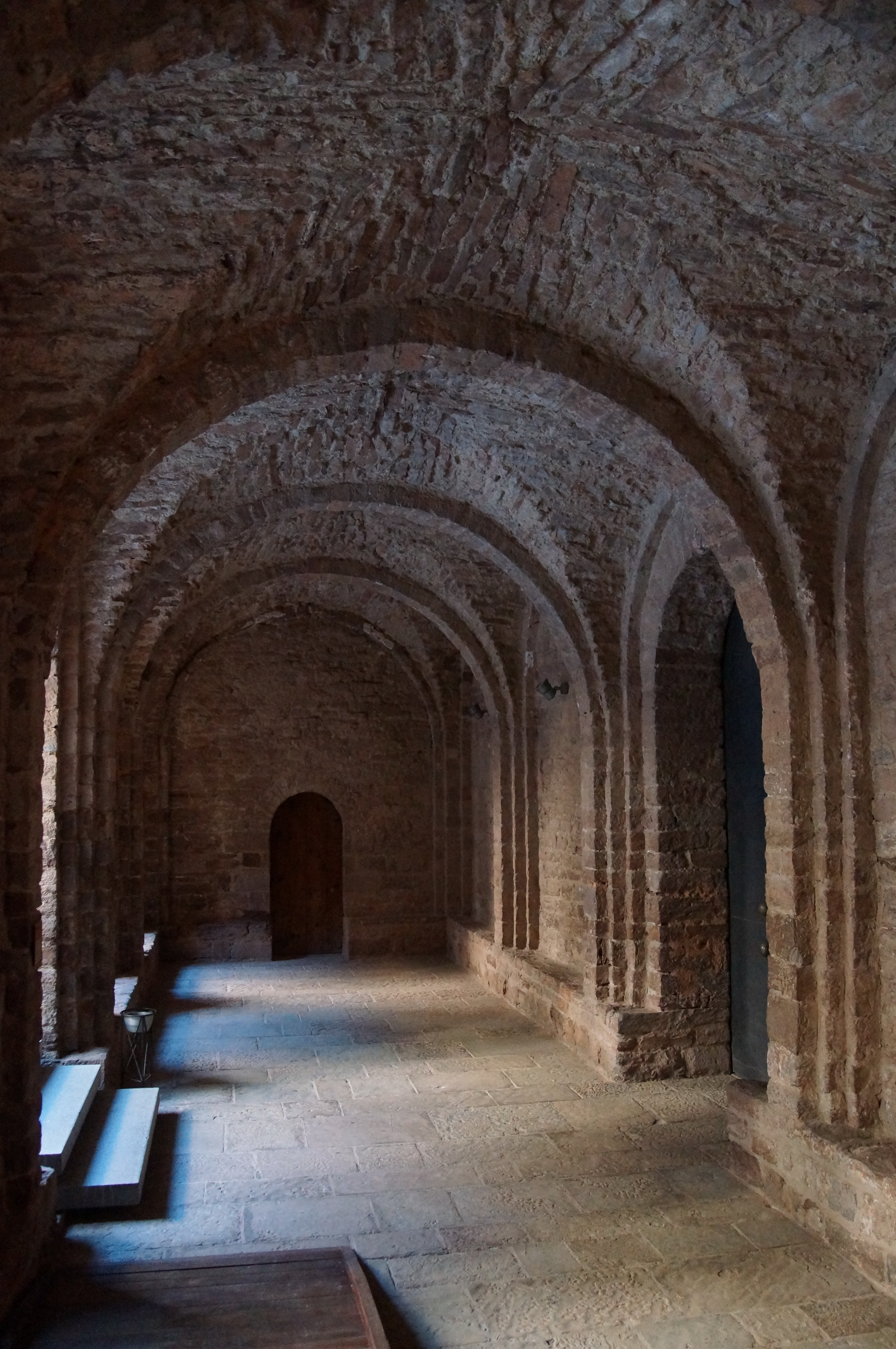 Canònica de Sant Vicenç de Cardona